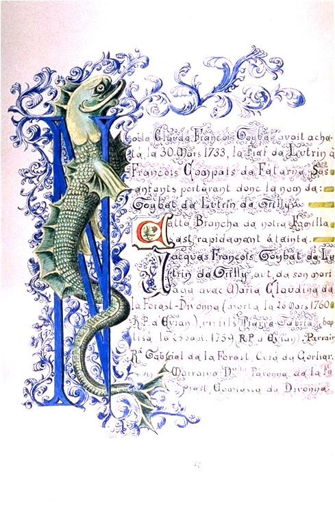 Enluminure du Livre de Mariano Goybet consacré à Noble Claude François Goybet et sa descendance. Noble Claude François Goybet (1680-1759), marié le 18 février 1730 avec Marie-Antoinette du Nant de Grilly (1709-1797), seigneur de Lutrin, anobli en 1758, avocat au souverain Sénat de Savoie, intendant du Chablais et Gaillard, intendant du Genevois. Ils ont deux enfants : Noble Jacques-François Goybet (1732-1783), seigneur de Lutrin et de Grilly, né le 10 avril 1732, épouse Marie-Claudine de La Forest-Divonne, dont Noble Pierre-Gabriel Goybet de Grilly et de Lutrin (1759-1782), Officier, mort tué d'un coup de feu au château de Châtillon, sans alliance ni postérité. Benoîte Goybet de Lutrin de Grilly, épouse le 3 mars 1753, Pierre-Claude de La Fléchère, comte de Veyrier-Châtillon, dont postérité